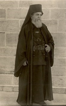 Васил Карагьозов – бивш директор на „Иван К. Калпазанов” АД за вълнени платове – Габрово, като схимонах Вениамин в Зографския манастир.